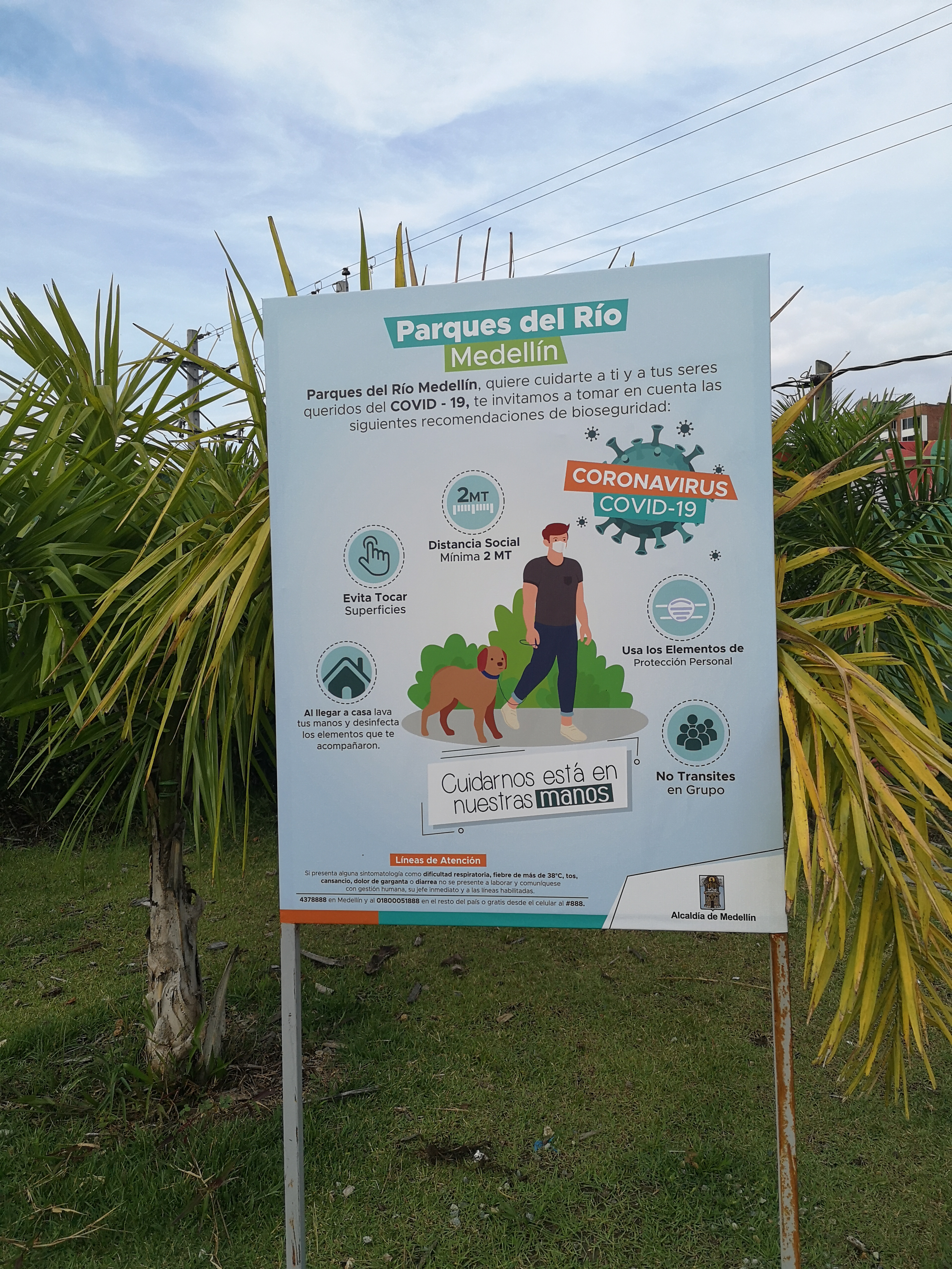 Señalética del coronavirus en Parques del Río Medellín